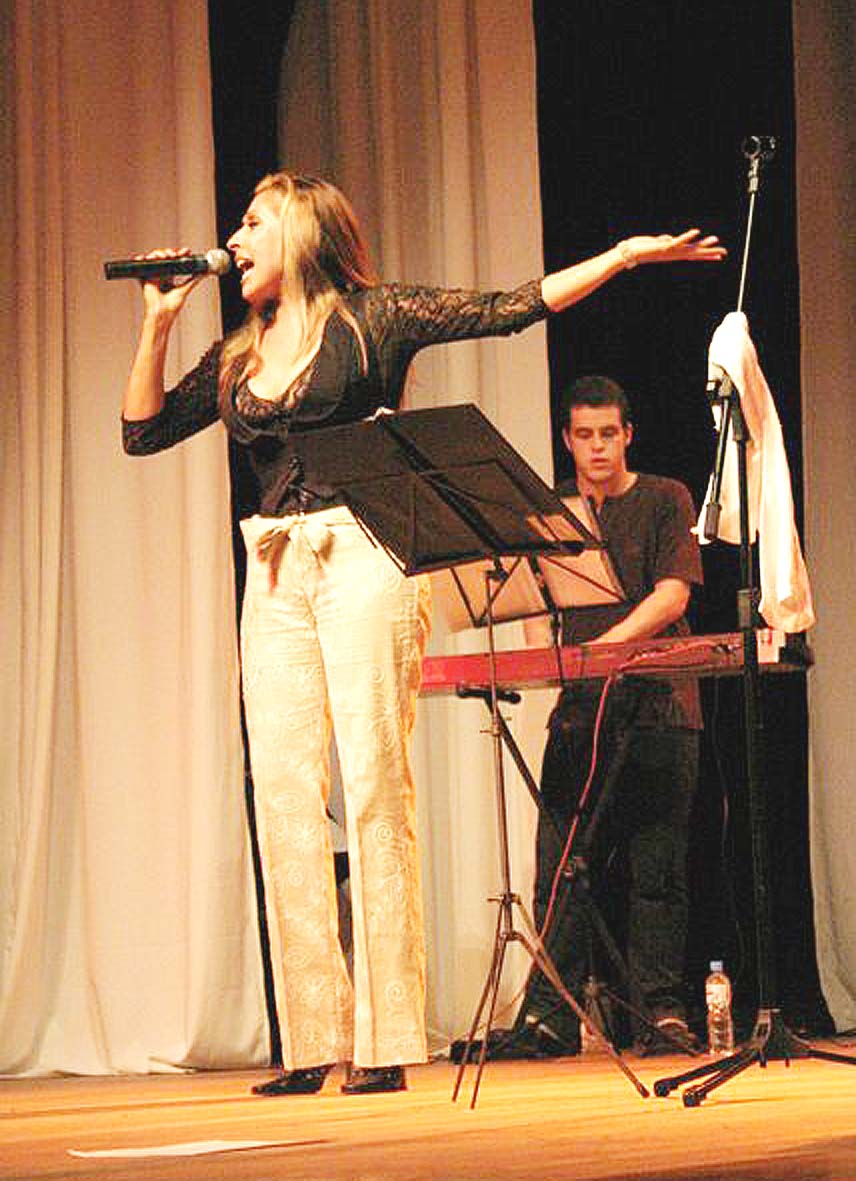 A cantora Jane Lago durante tributo a Raul Seixas no Teatro Santo Agostinho.